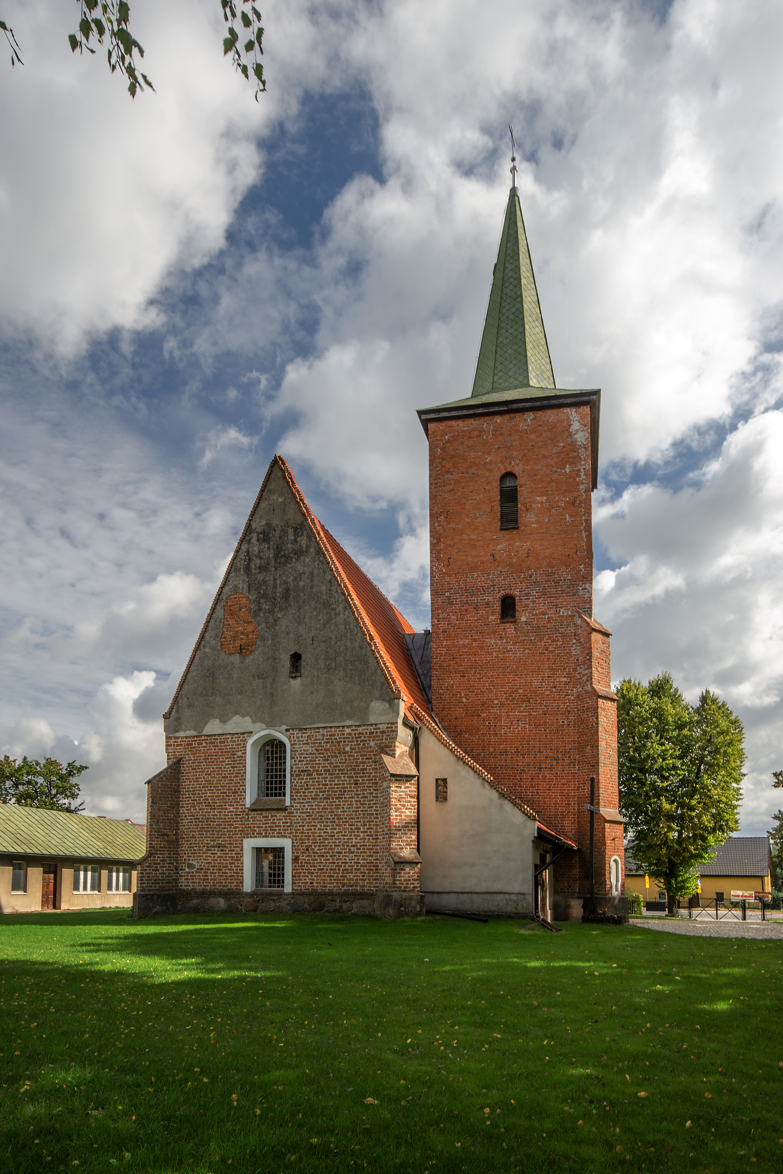 Stępin 73, kościół fil. p.w. Narodzenia NMP, XV, XIX/XX